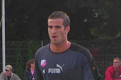 David di Tommaso, voormalig speler van FC Utrecht